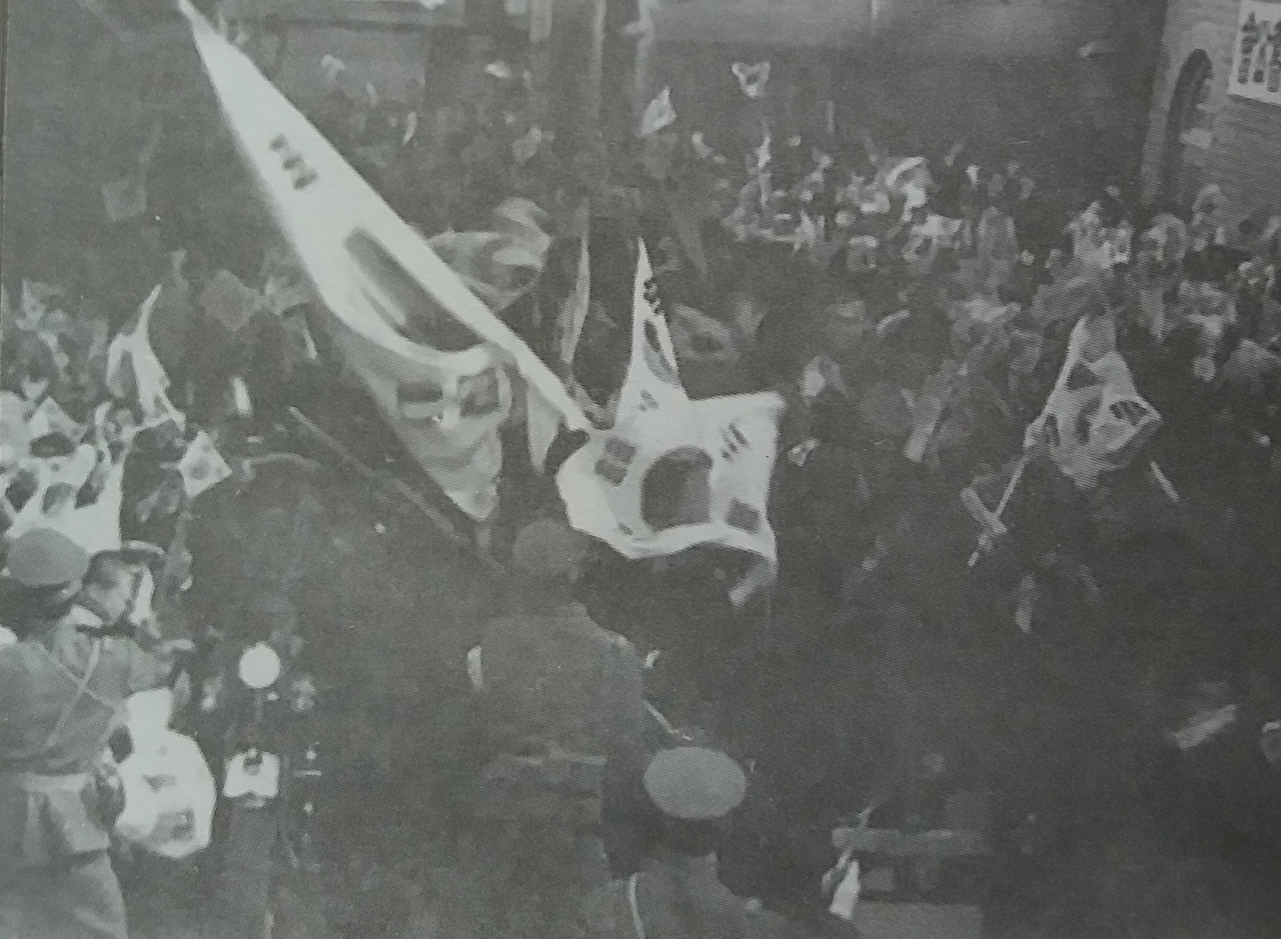 韩国三一运动